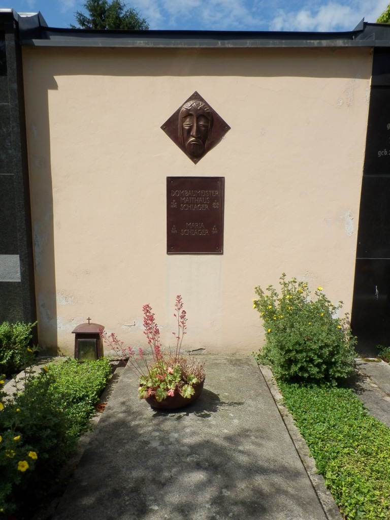 Grabstätte von Matthäus Schlager (Architekt und Dombaumeister), Barbarafriedhof Linz